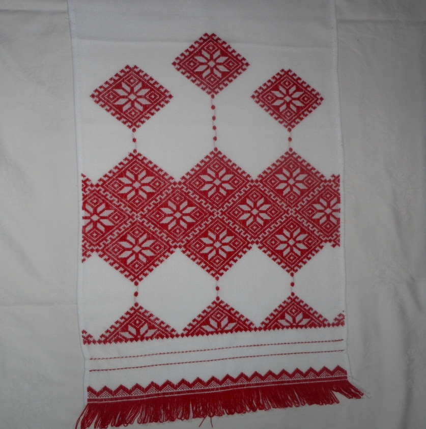 рушник 16